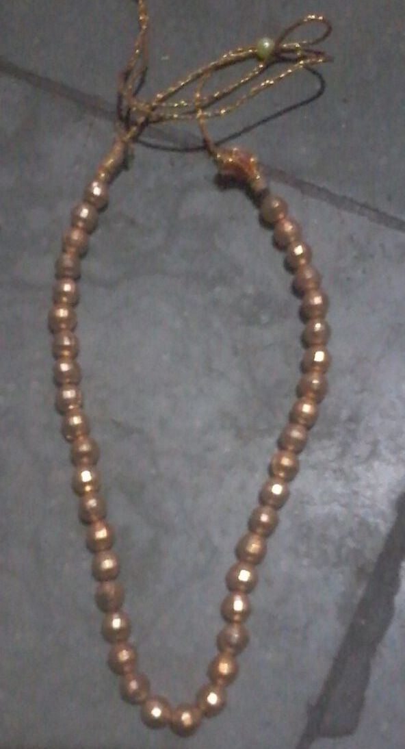 बोरमाळ